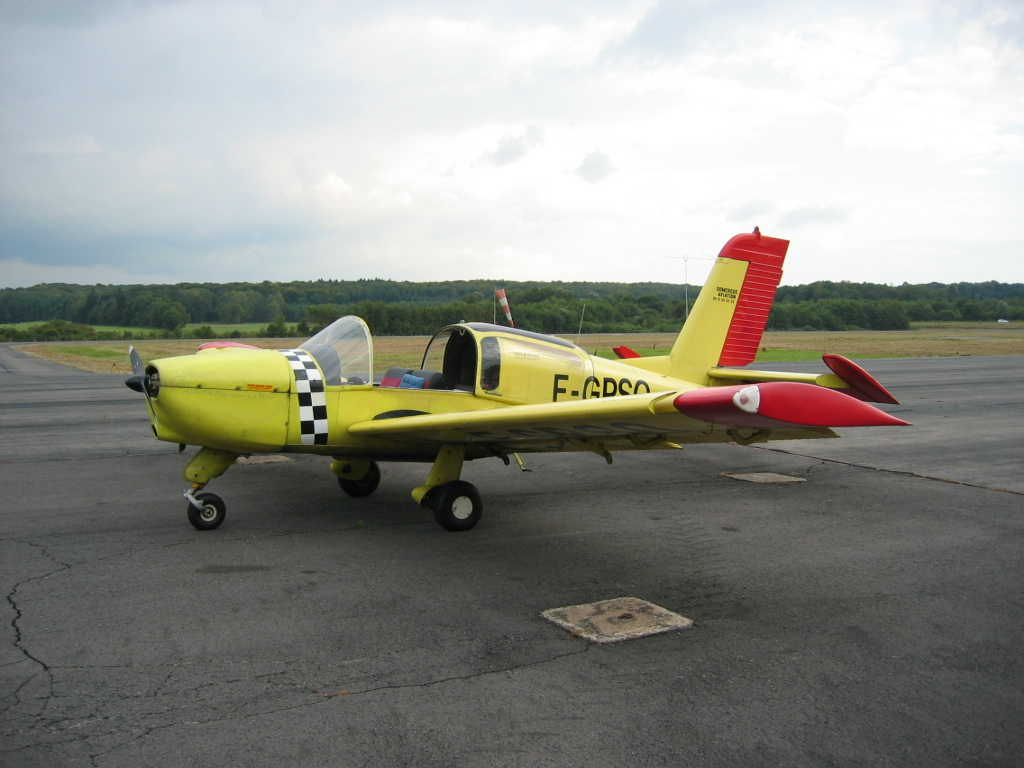 Morane Saunier Rallye - Aérodrome de Besançon - La Vèze